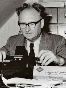 Franz Weber, Lehrer und Bildautor